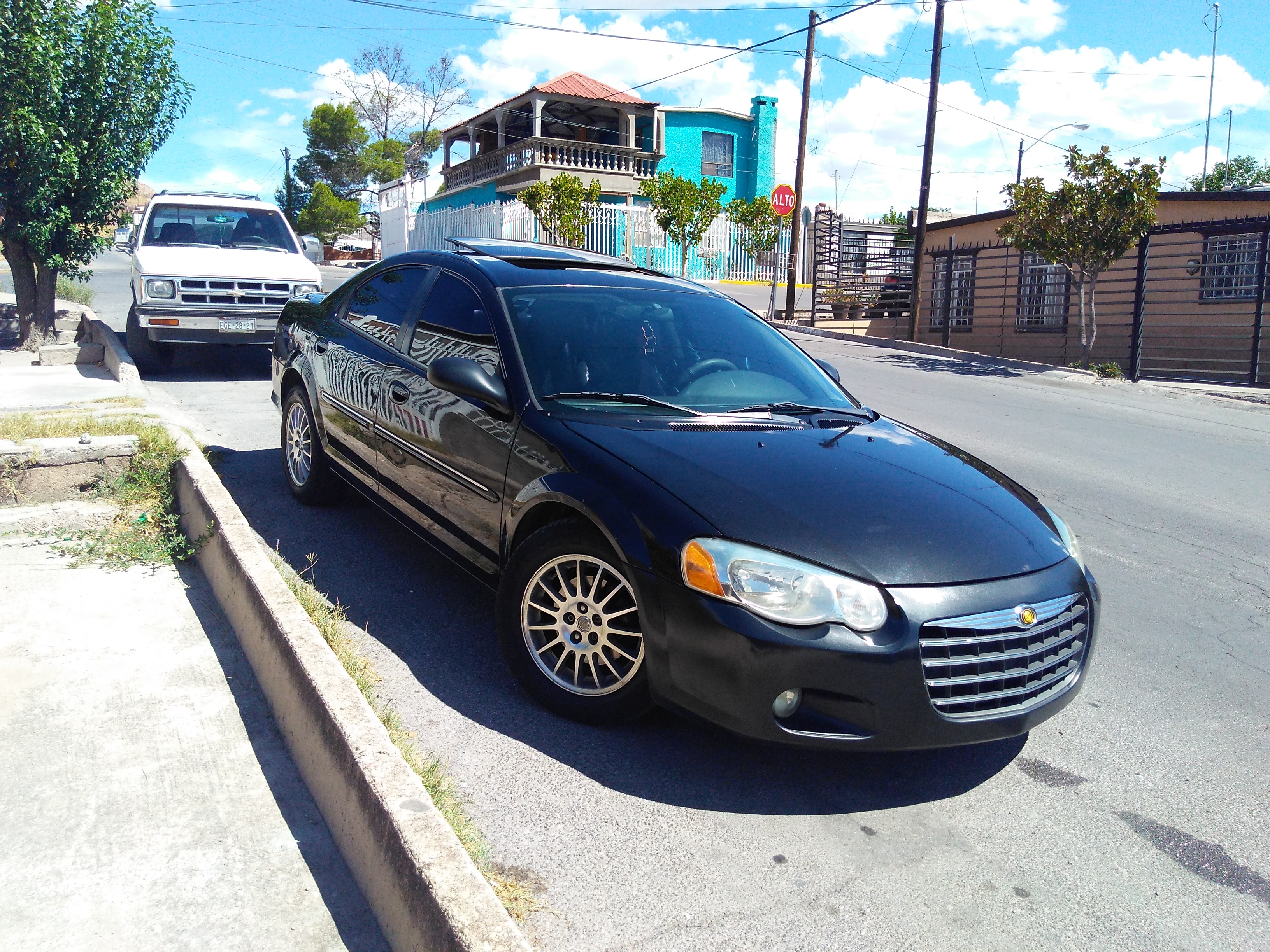 Chrysler Cirrus 2005 versión 2.4 litros Turbo cargado, High output.